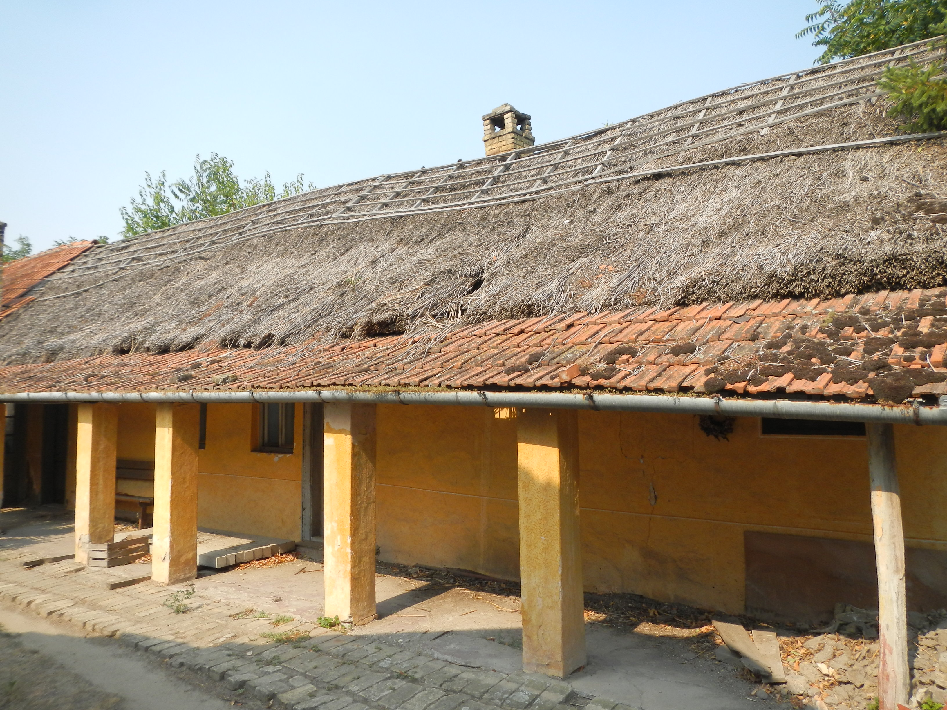 На старим мапама Келебије с краја 18. века забележени су бројни салаши келебијске пустаре у улици тада званој Керњаски пут. Једна од многобројних кућа ове фамилије налази се на списку културних добара - кућа у данашњој улици Кизура Иштвана на броју 131. Изграђена је у 19. веку у стилу народне архитектуре, панонска кућа.